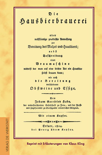 Cover des Buches "Die Hausbierbrauerei" von 1804, Autor Johann Gottfried Hahn; Faksimilierter Reprint